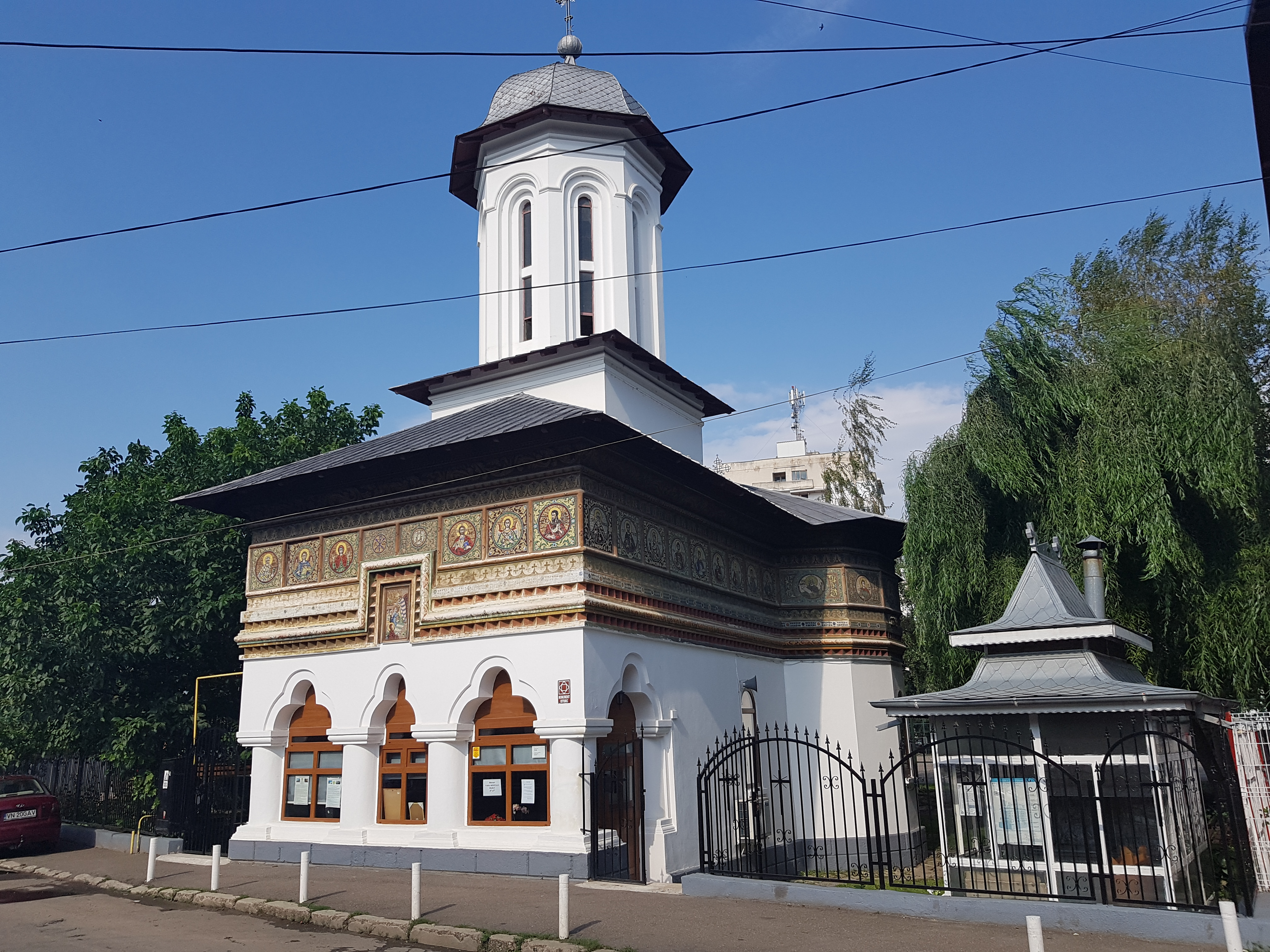 Biserica „Intrarea Maicii Domnului în Biserică”, „Ovidenia”